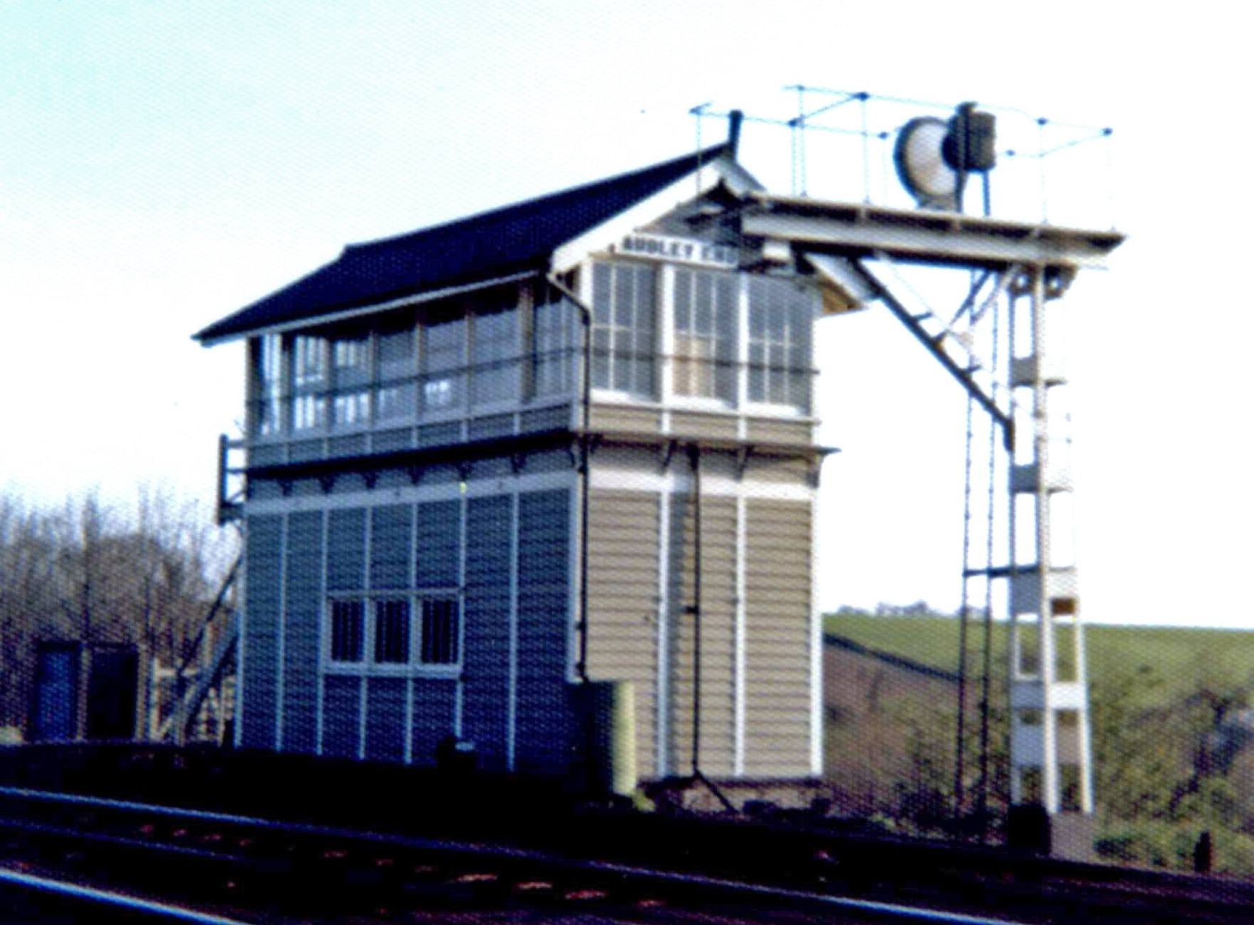 c 1977